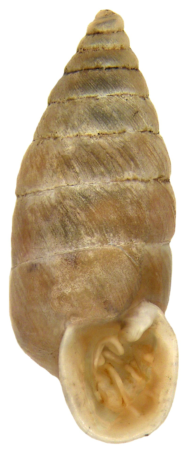 Familie: Chondrinidae Groesse: 9-11,5 x 3,2-4 mm Verbreitung: Tessin, südöstliches Österreich Ökologie: trockene, offene Standorte auf kalkreichem Untergrund Fundort: Schweiz, Tessin, Gandria Photo: U.Schmidt, 2007